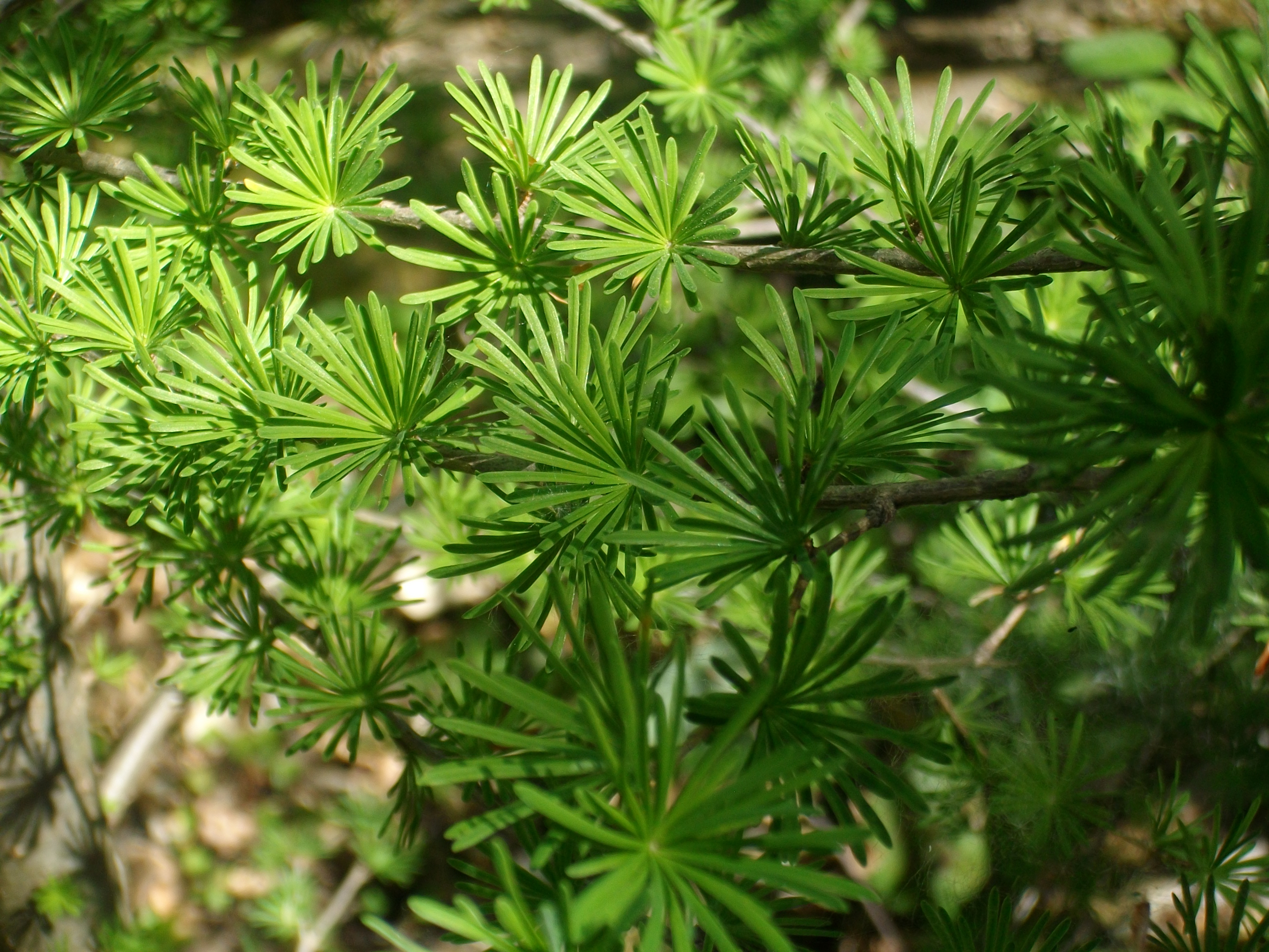 Im Frühjahr austreibende Japan-Laerche im Naturreservat Teufelskeller in Baden (Schweiz).